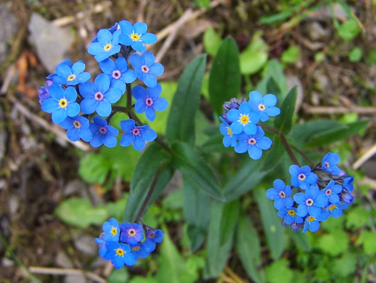 Myosotis alpestris (pl. niezapominajka alpejska), habitat: Tatra Mountains, Kobylarzowy Żleb